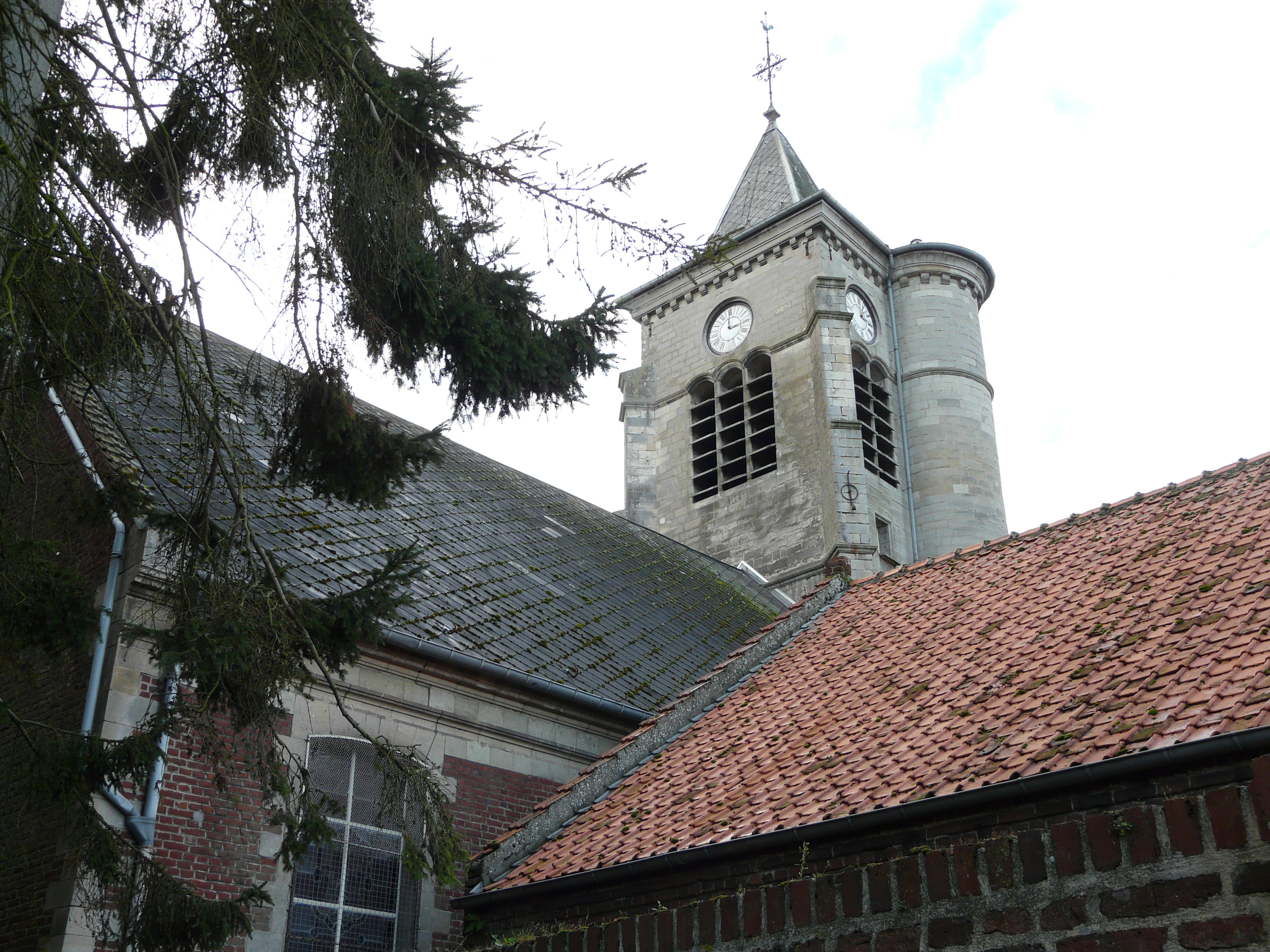 L'église de Bantigny (Nord), côté gauche